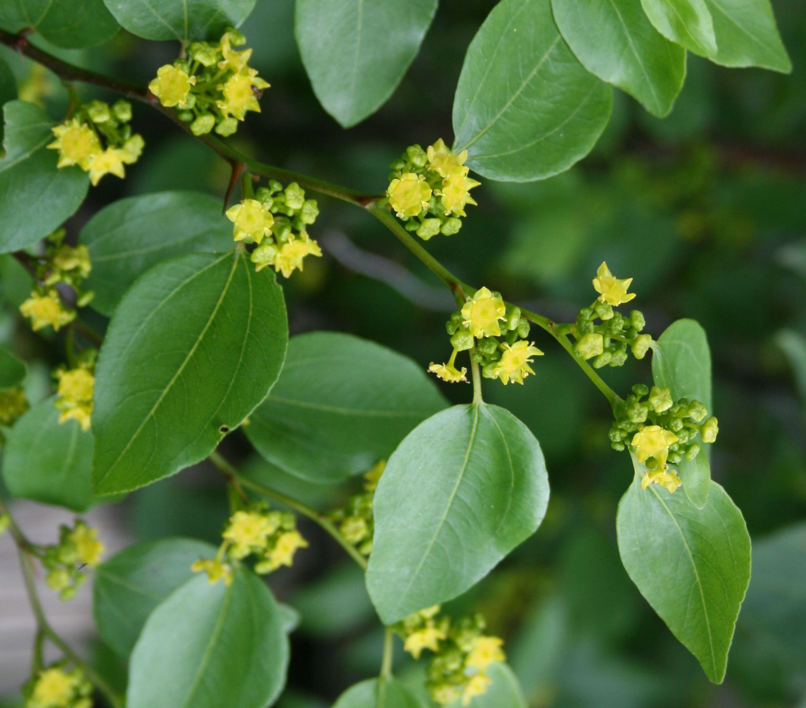 Paliurus spina-christi, Kreuzdorngewächse (Rhamnaceae) - Italien/Italia/Italy: Friuli-Venezia Giulia, Prov. Trieste, Rilkeweg/Sentiero Rilke von Sistiana nach Duino